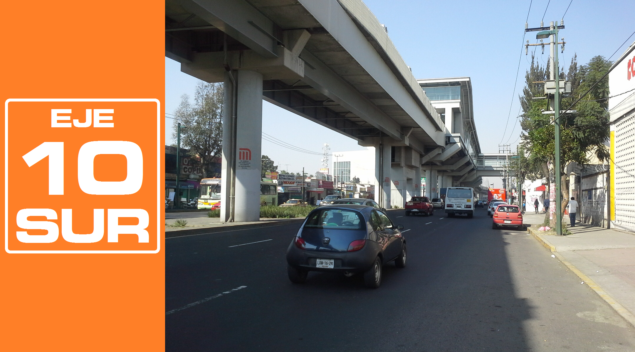 Rediseñado original de la señalética de los Ejes viales de la Ciudad de México por José García (Wiki ID: narumiyama)